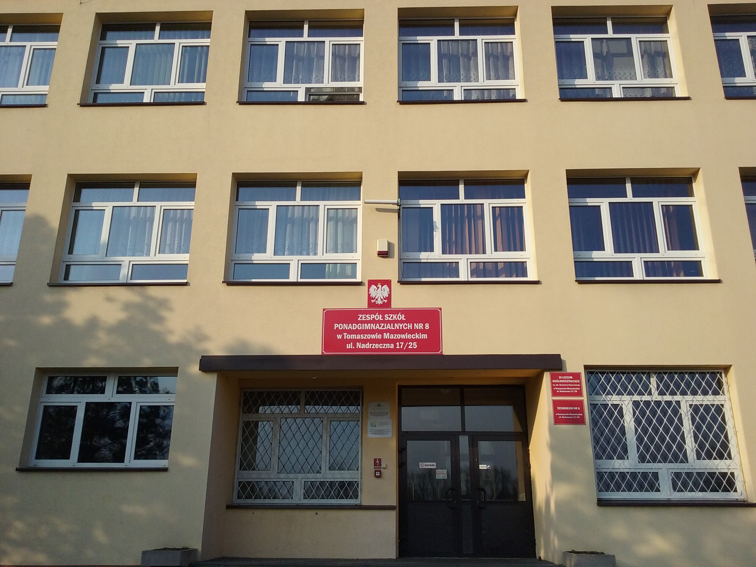 Tomaszów Mazowiecki w województwie łódzkim. PL, EU. Głowne wejściedo Zespołu Szkół Ponadgimnazjalnych nr 8 przy ulicy Nadrzecznej. Przez wiele lat wśród tomaszowian szkoła nazywana "Chemikiem"